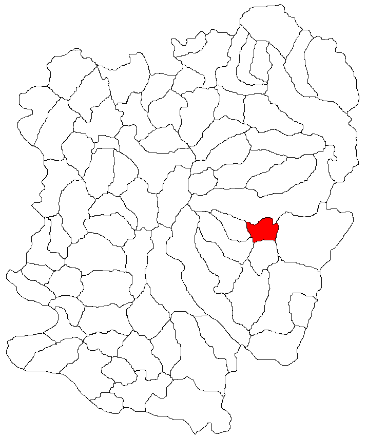 Categorie:Hărţi ale judeţului Caraş-Severin